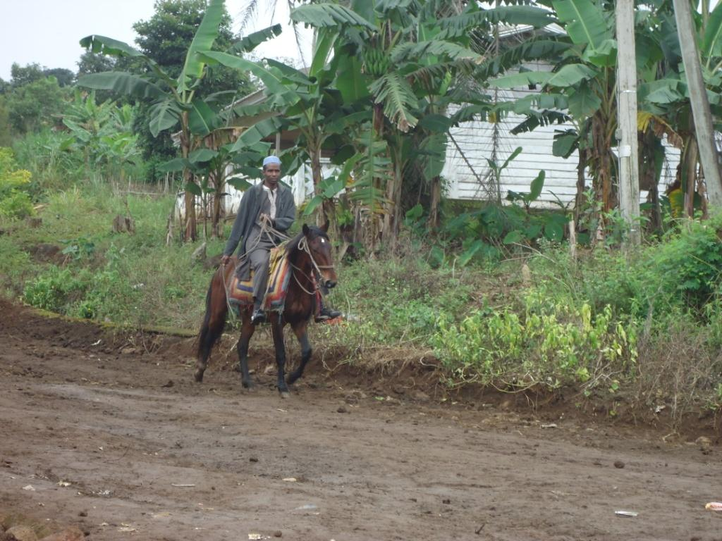 Balade à cheval d'un bororo à Bouroukou